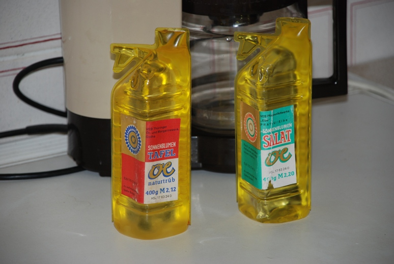 Speiseölflaschen als Anwendungsbeispiel für gölzalit-pvc-Folien